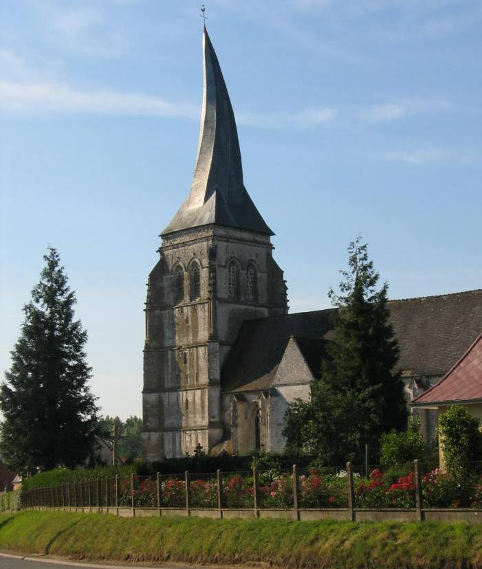 Kerk Verchin met gedraaide toren